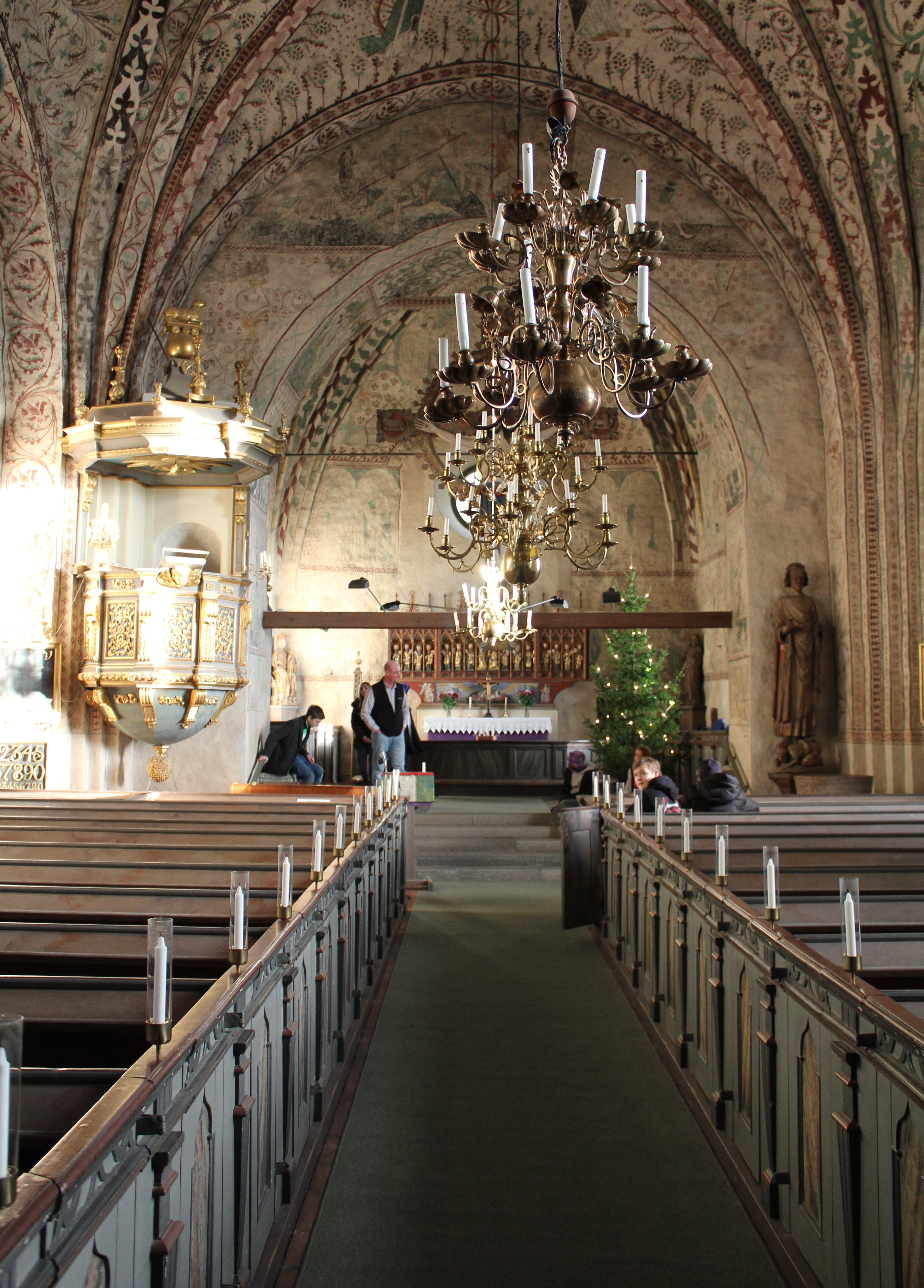 Roslags-Bro kyrka i Norrtälje kommun. Interiör.